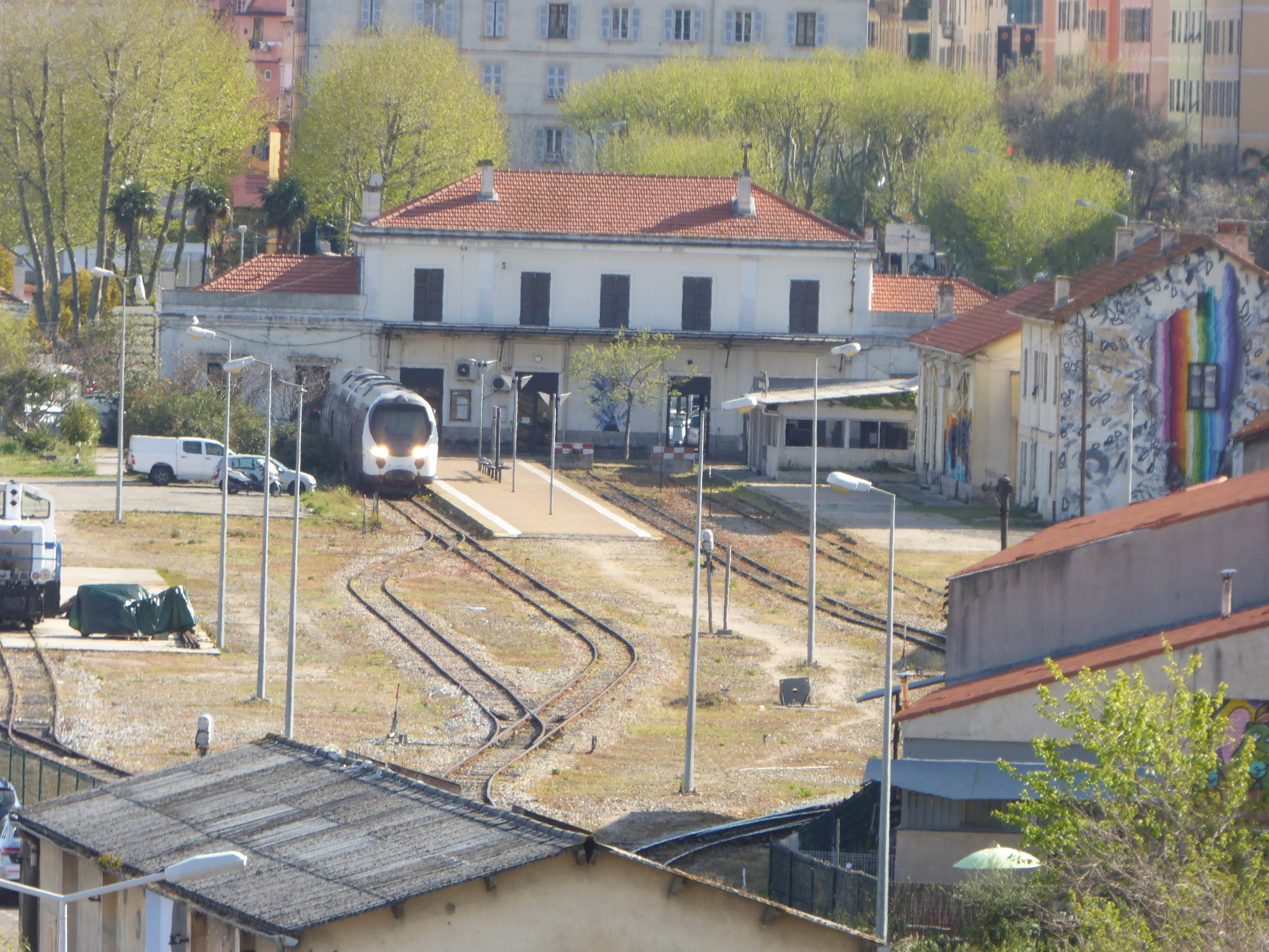 Gleisvorfeld des Bahnhofs von Ajaccio